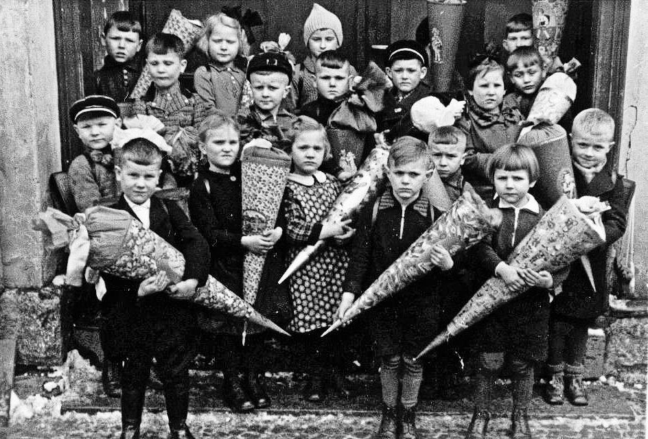 Volksschule Haynrode, Schulanfänger 1940